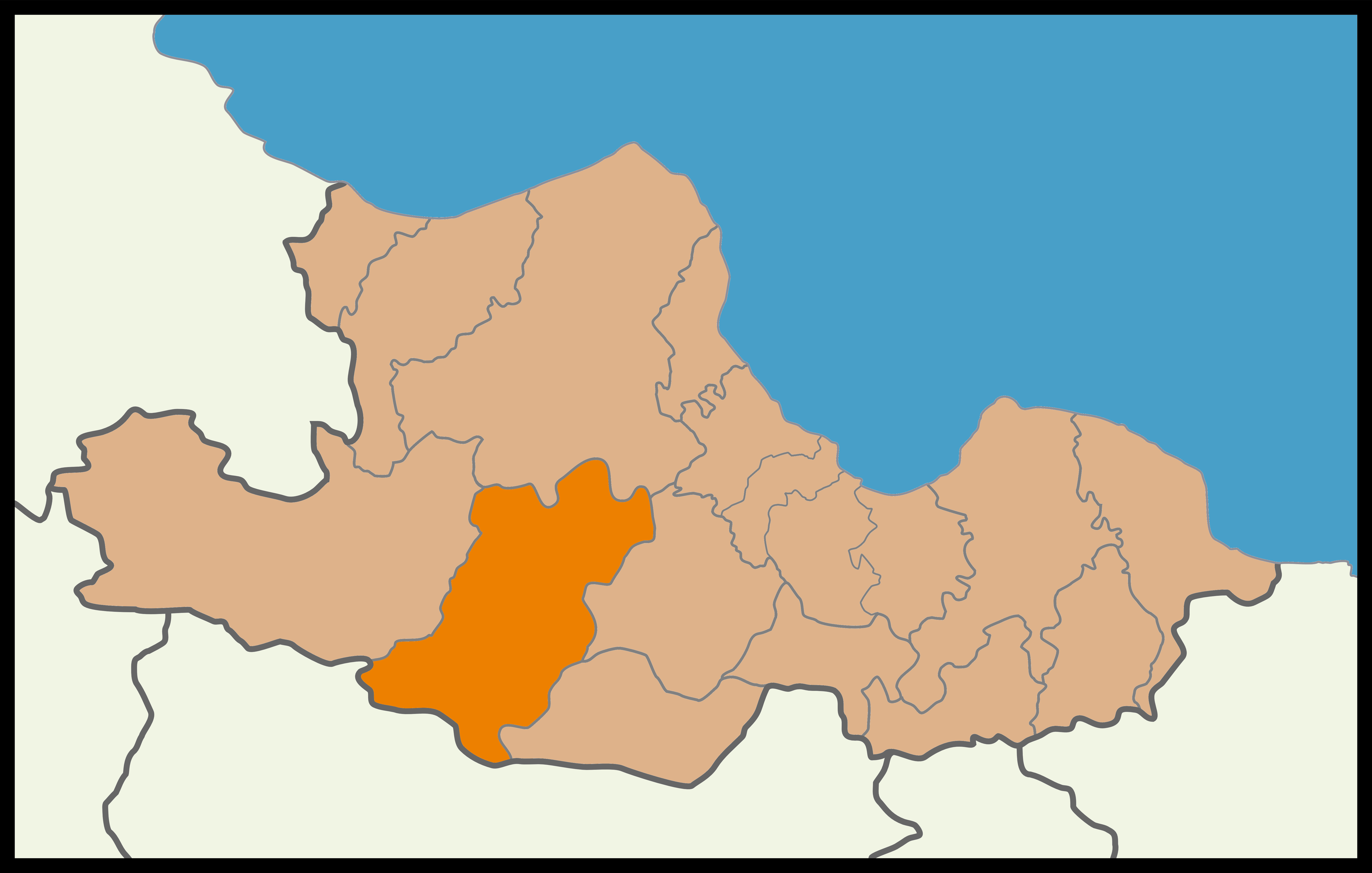 Samsun'un Havza ilçesinin 2014 Türkiye yerel seçimleri haritası.